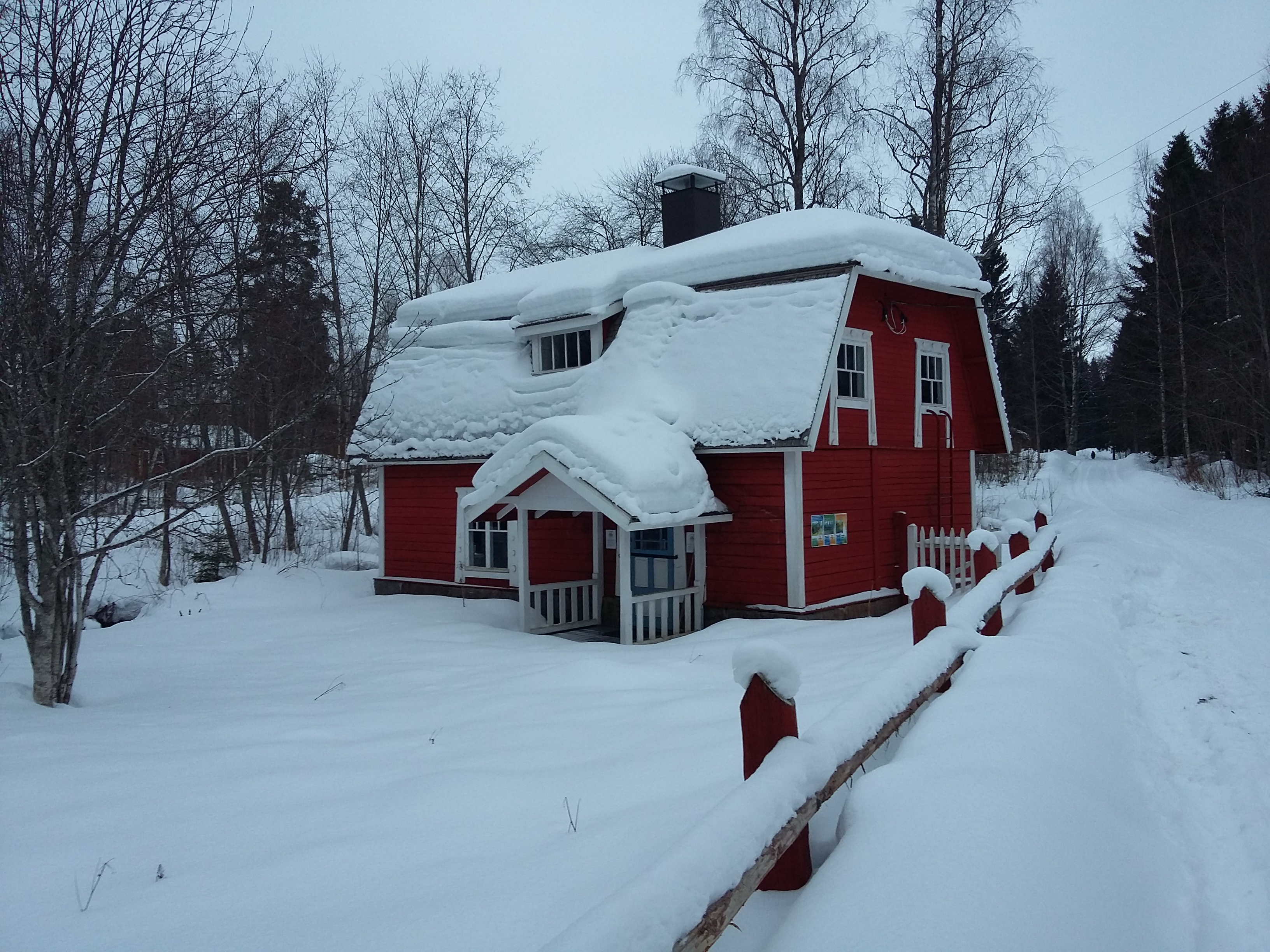 Huopanankosken vanha hautomo, jossa on nykyään kalastushistoriallinen museo. Huopanankoski sijaitsee Viitasaarella, pohjoisessa Keski-Suomessa.